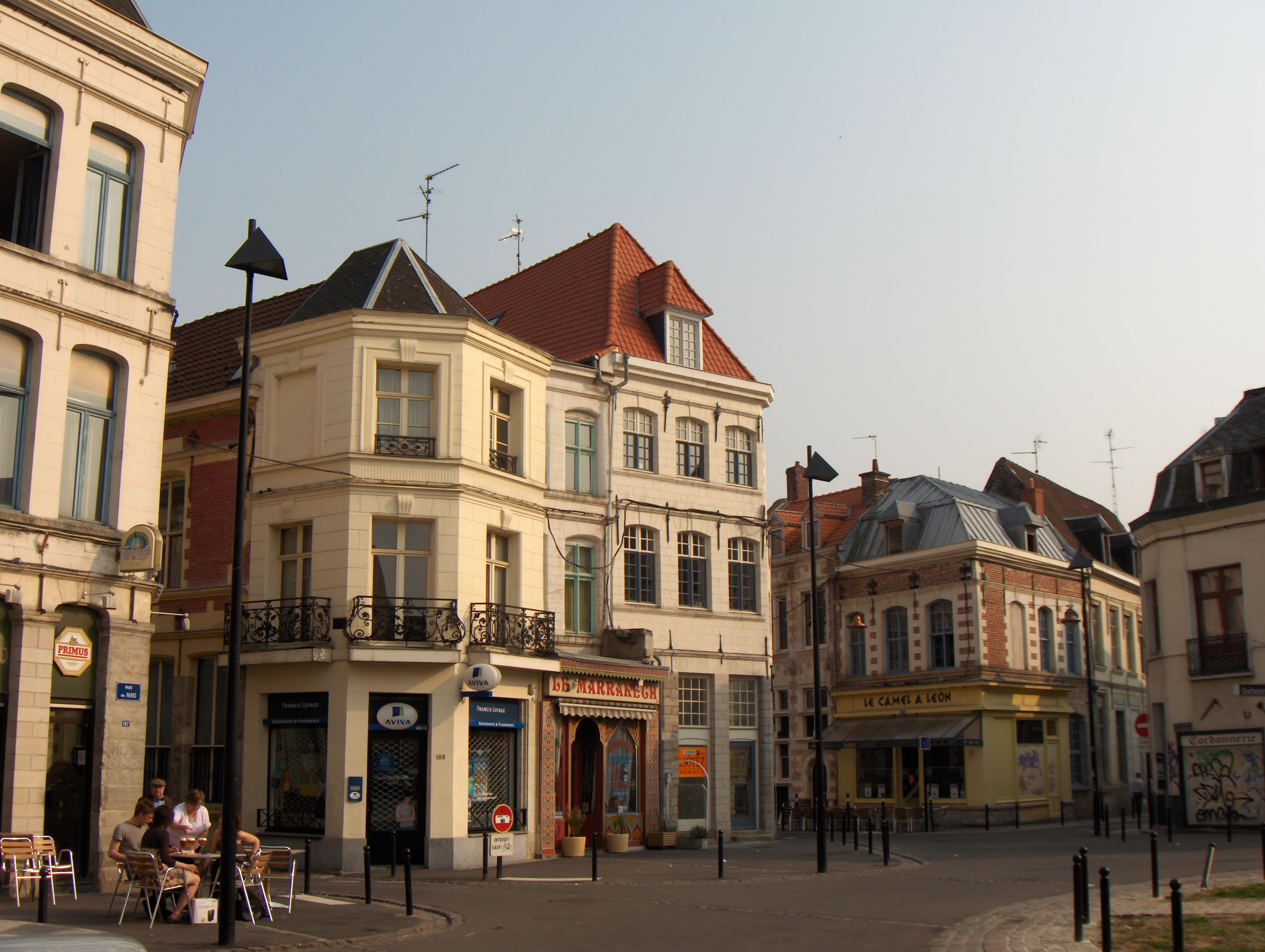 Valenciennes (dépt. Nord), Place de Neuf Bourg